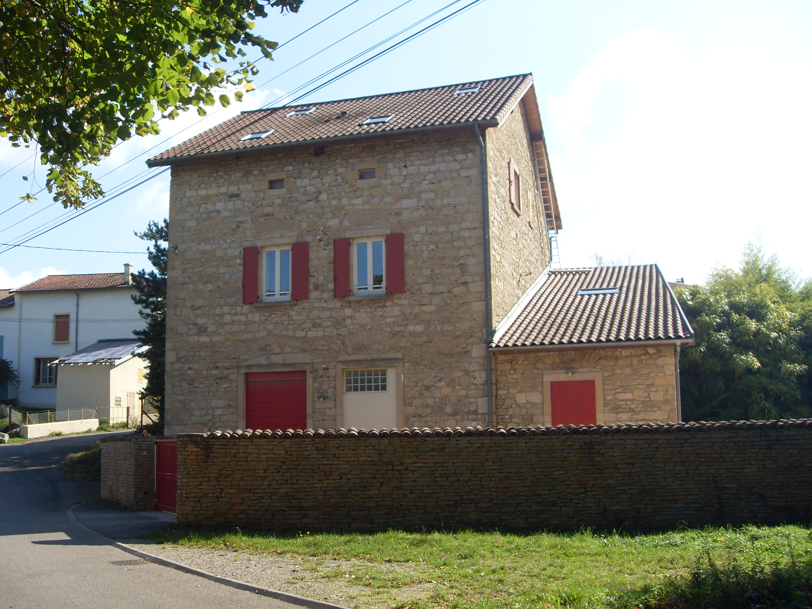 Ancien moulin du Pont. Moulin à eau, puis centrale électrique, il fait maintenant office d'habitation. Villefontaine (Isère)